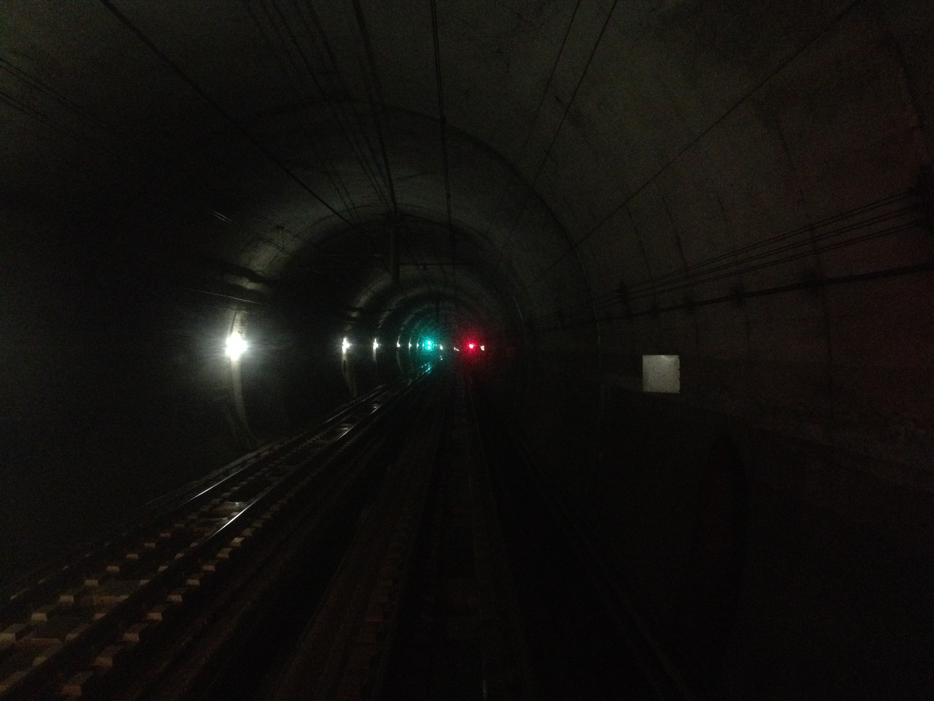 赤倉信号場構内-1